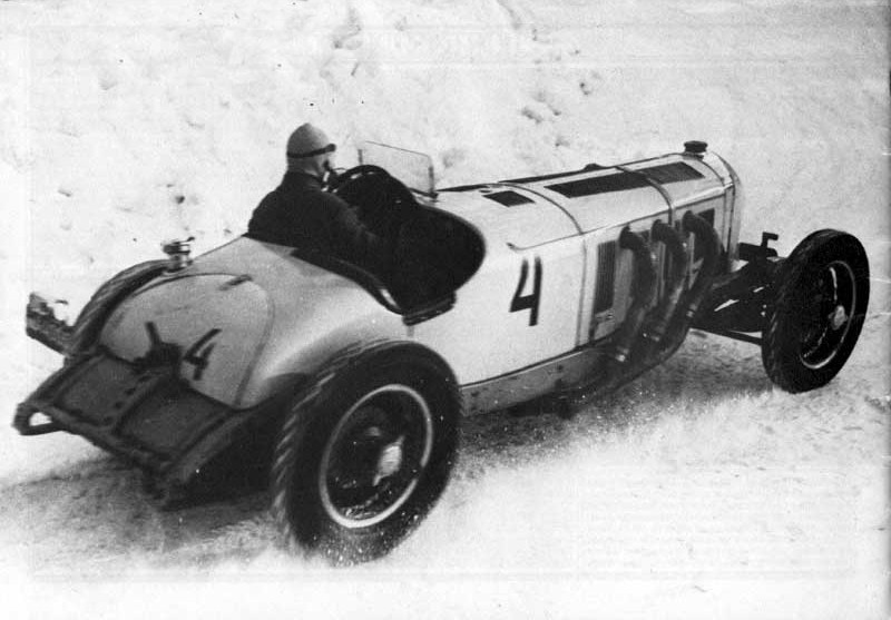 Finländaren Karl Ebb med sin Mercedes-Benz SSK under 1936 års Rämenlopp.